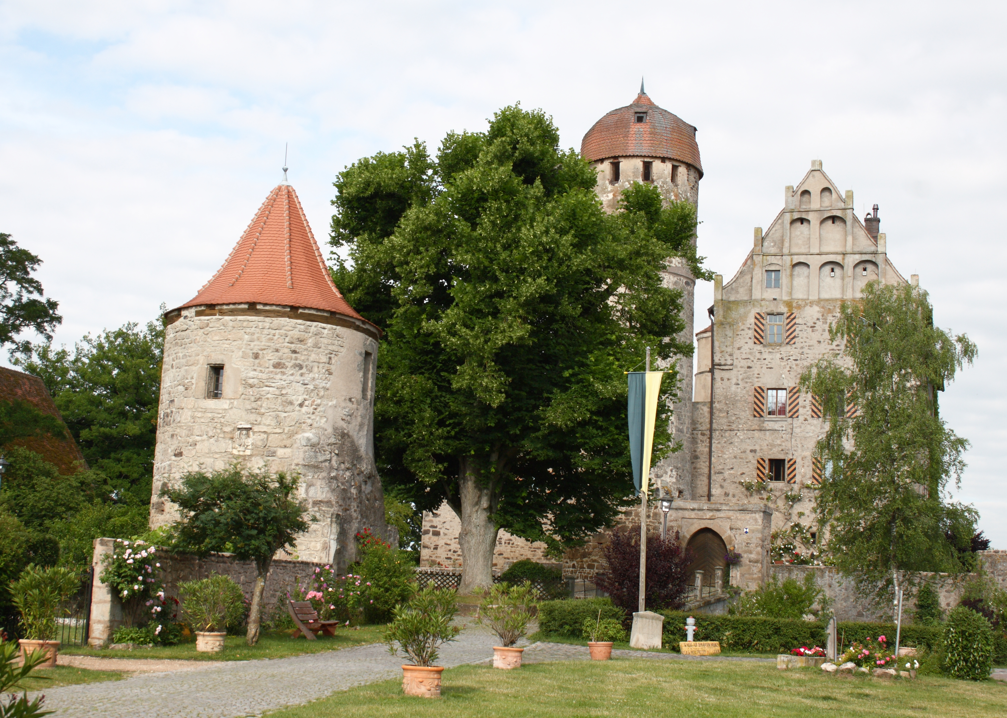 Schloss in Sommersdorf (Burgoberbach) im Landkreis Ansbach (Bayern)